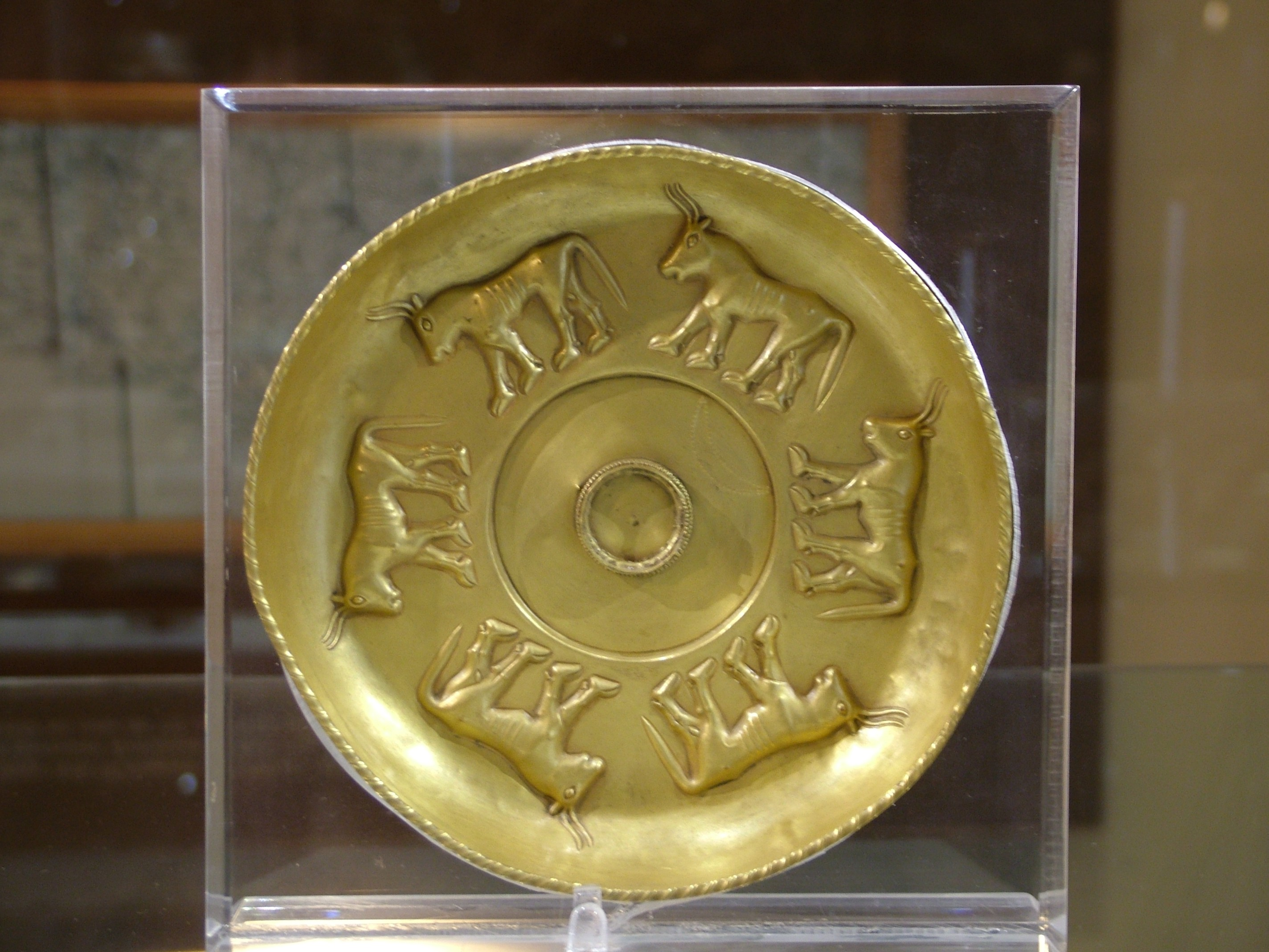 Goldscheibe von Sant Angelo Muxaro, diese Kopie steht im Archeological Museum of Agrigento, das Original steht im Britischen Museum in London